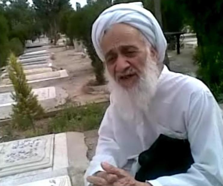 از آخرین تصاویر شیخ علی تهرانی